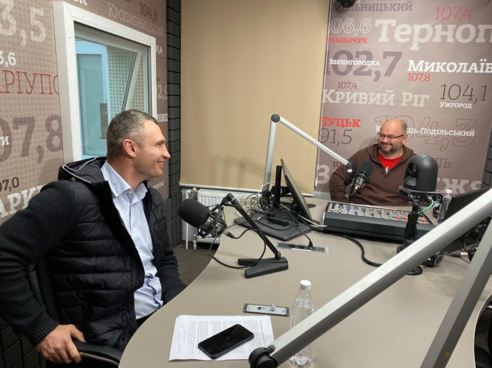 Мер Києва Віталій Кличко в ефірі радіо «НВ».